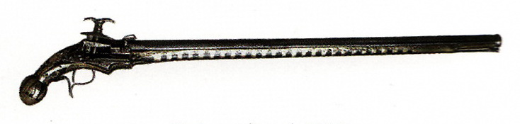 Pedrenyal català. Segle XVII. Museu Militar de Montjuïc